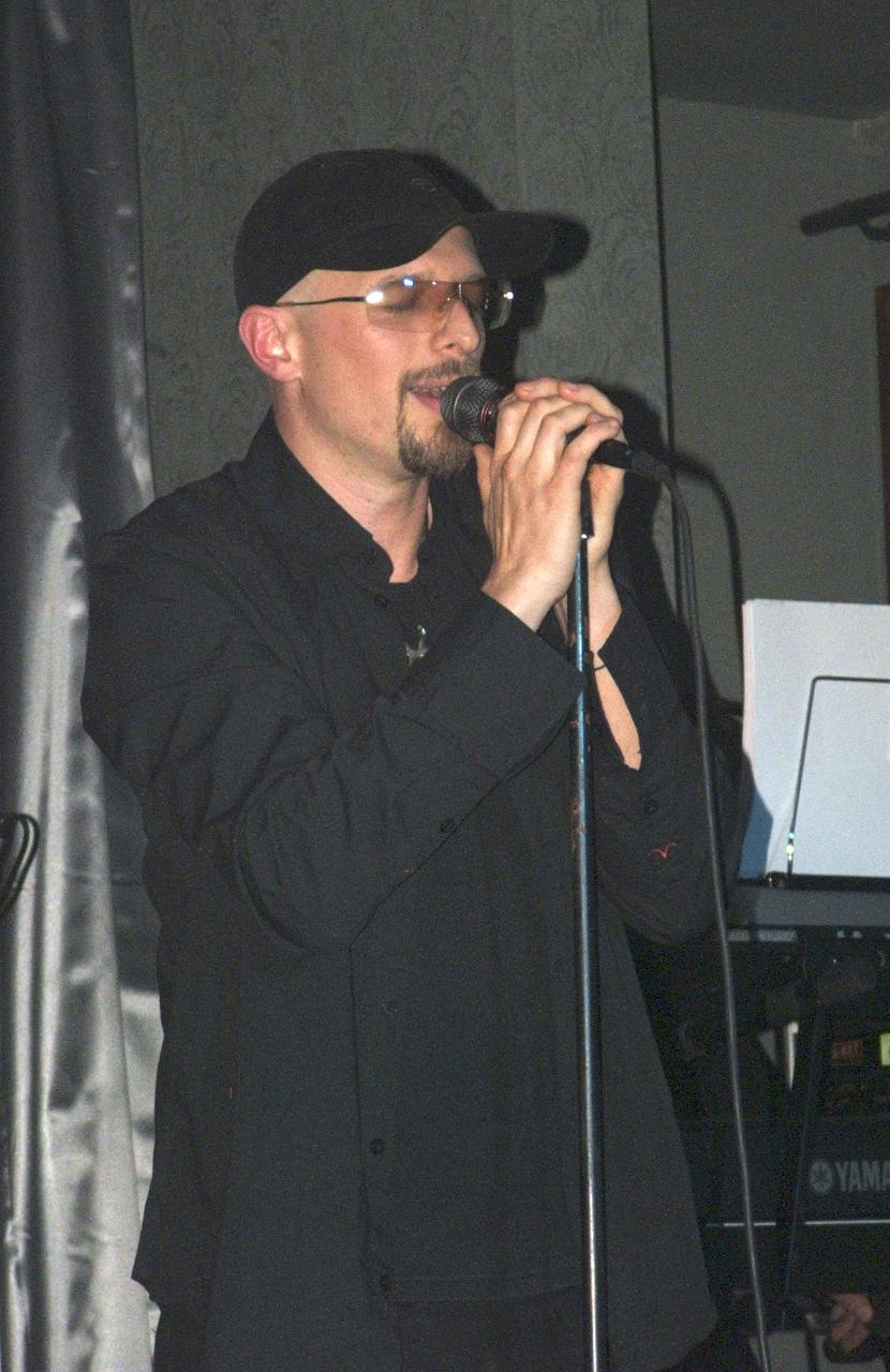 Luky